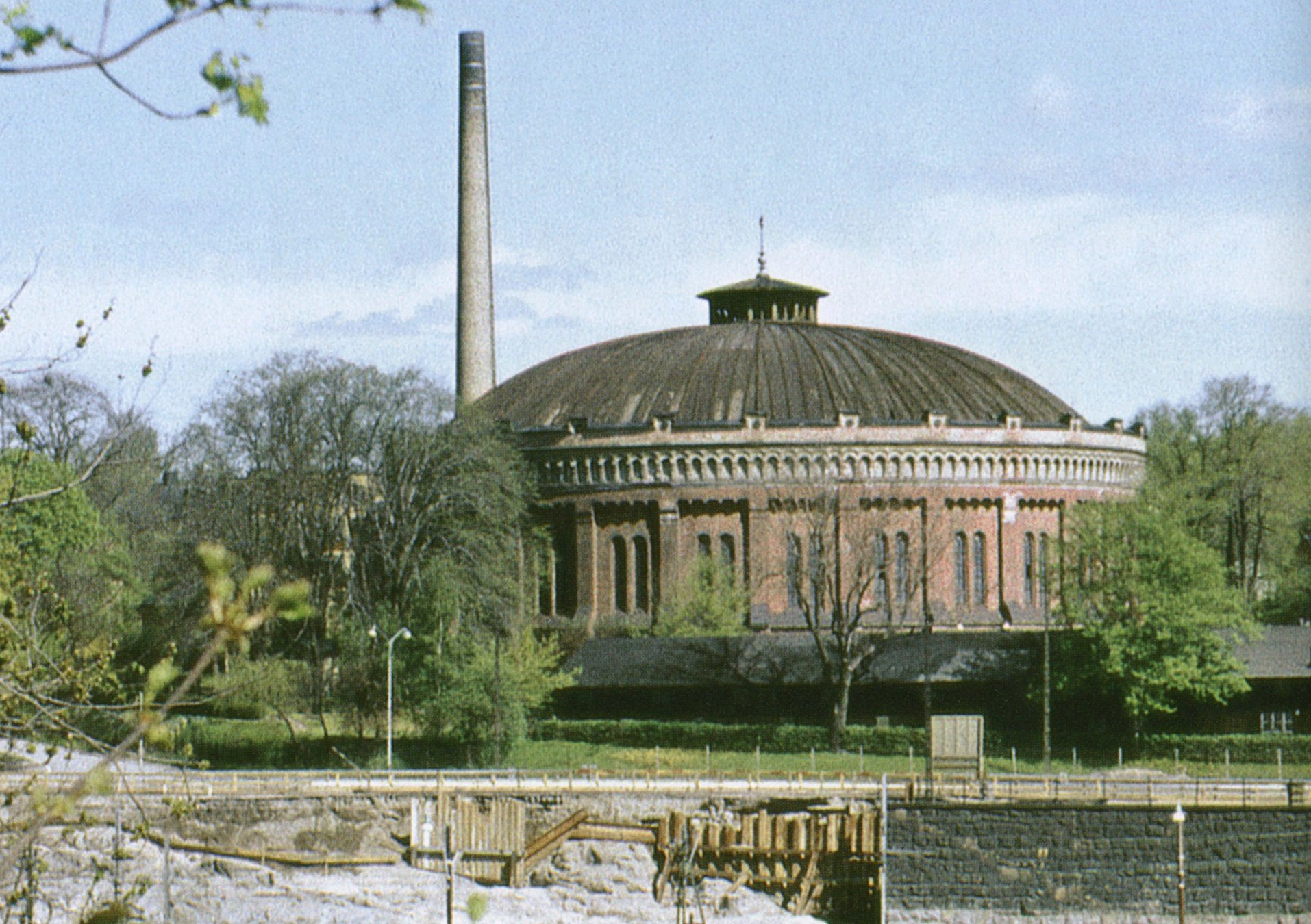 Gamla gsaklockan vid Sabbatsberg i Stockholm